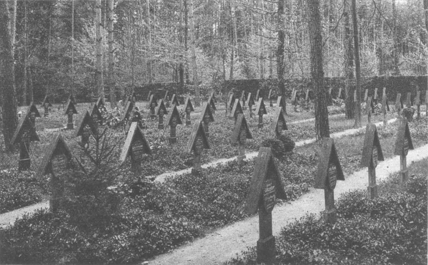 Waldfriedhof in Stuttgart, Kriegerehrenfeld, 1924.